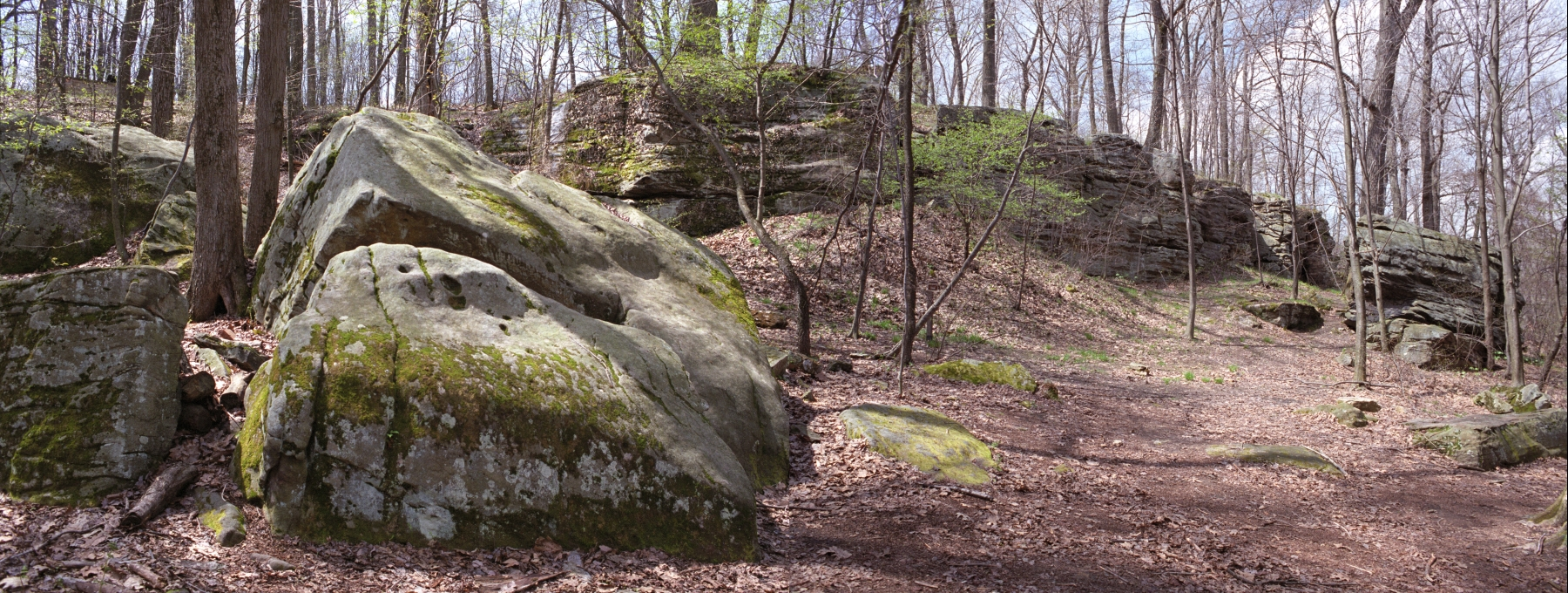 JumonvilleGlenPanorama_5_2_2007